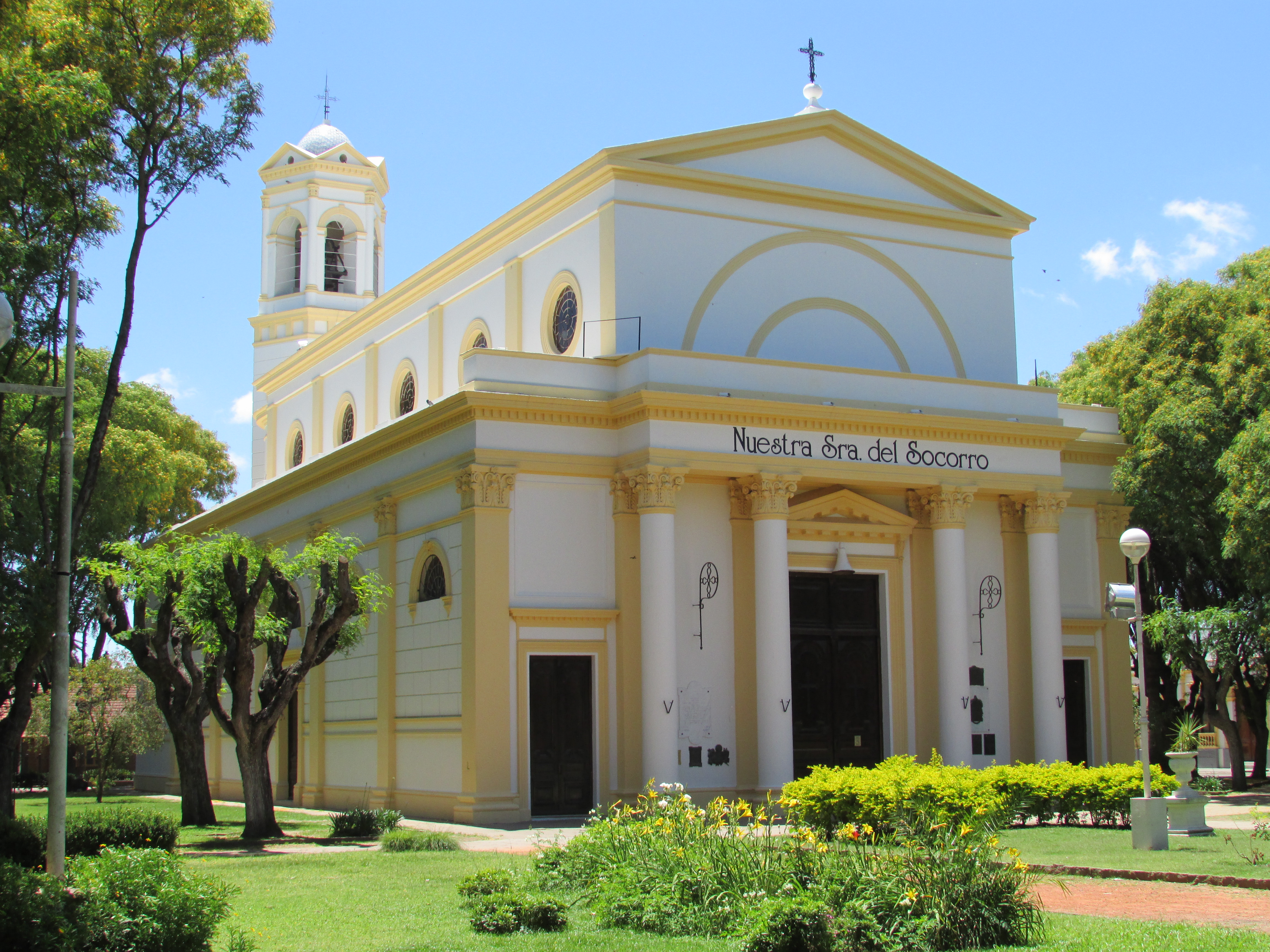 Iglesia de Nuestra Señora del Socorro en San Pedro, provincia de Buenos Aires, Argentina.